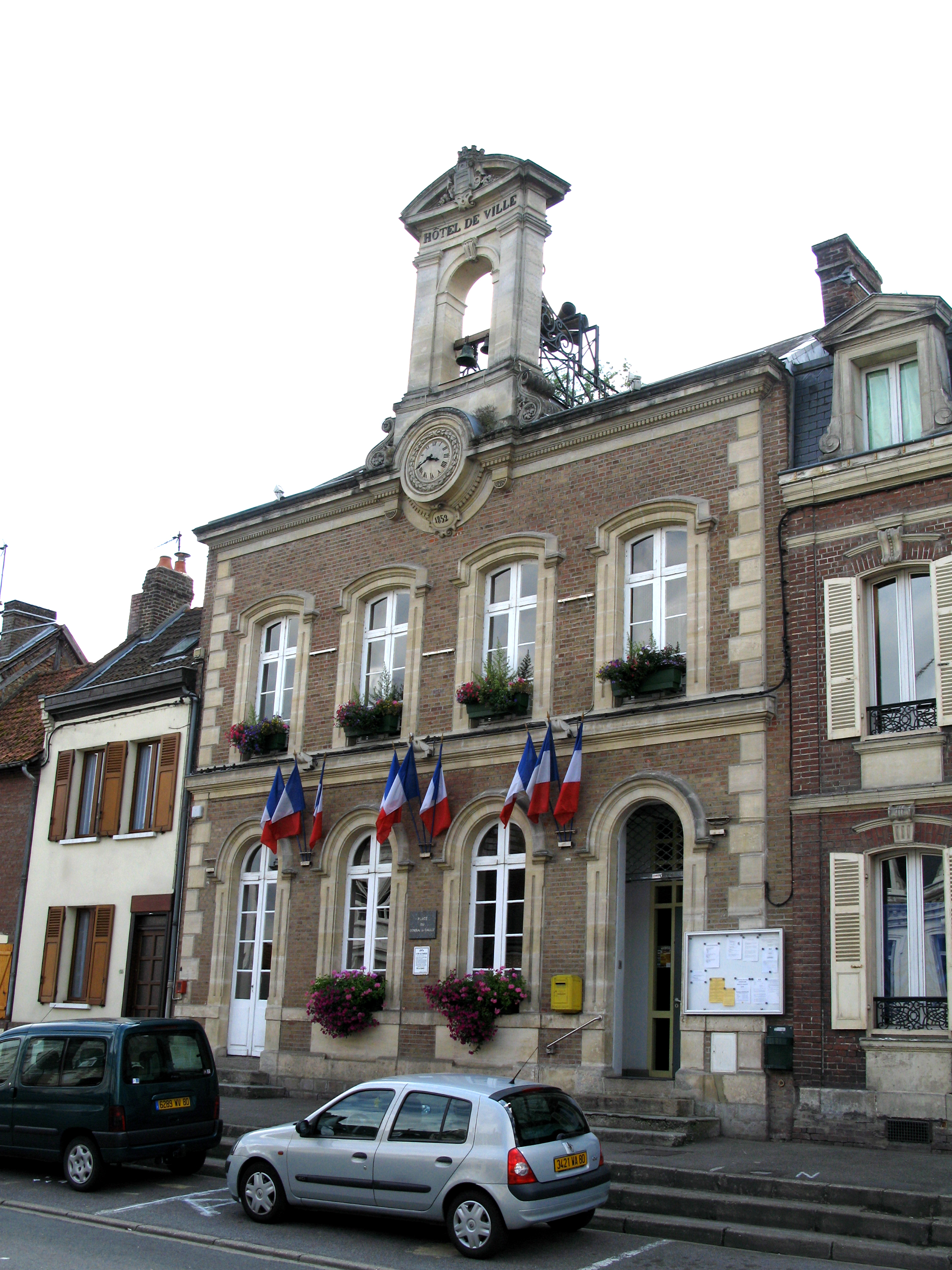 Picquigny (Somme, France) - La Mairie, dont la date de construction est parfaitement lisible, sous l'horloge (1852). .